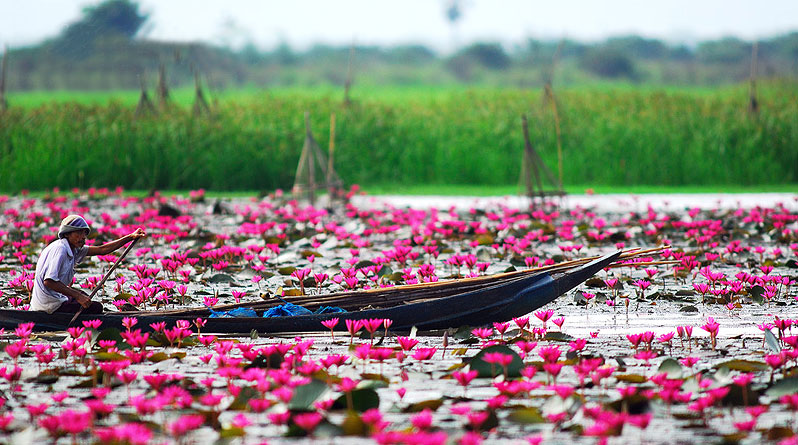 cr.Thailand Tourism Directory